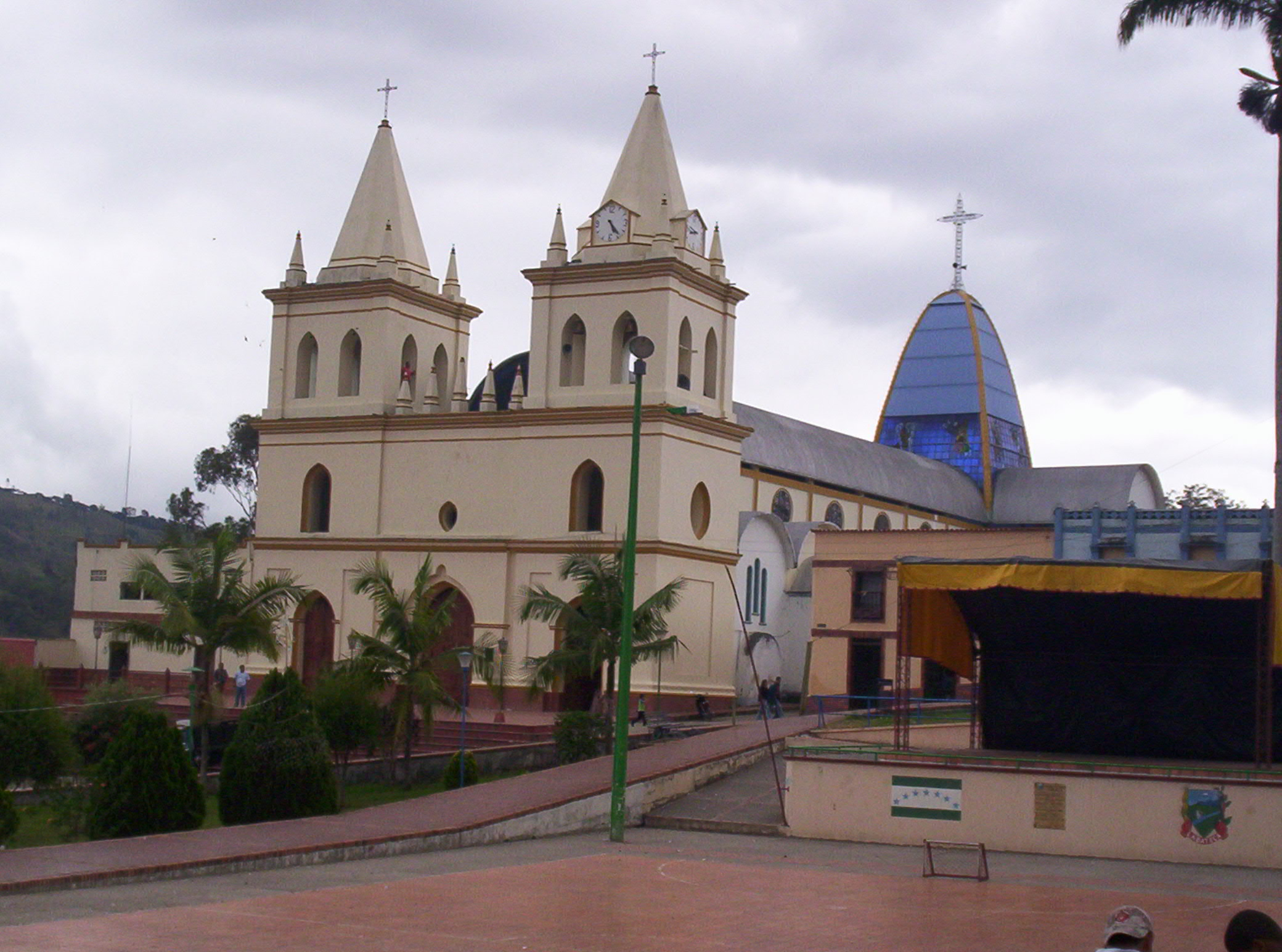 Templo católico de Labateca.